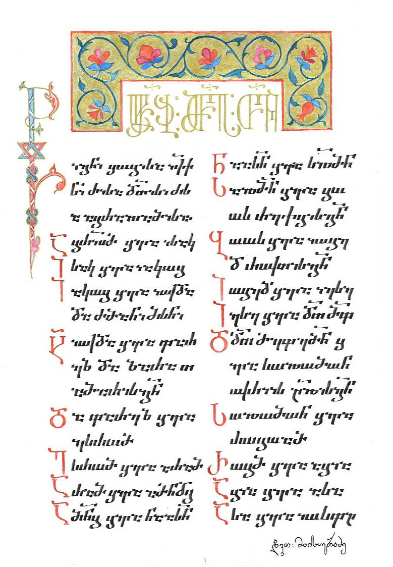 კალიგრაფი დავით მაისურაძის ნამუშევარი, დაფუძნებული მოქვის სახარებაზე.